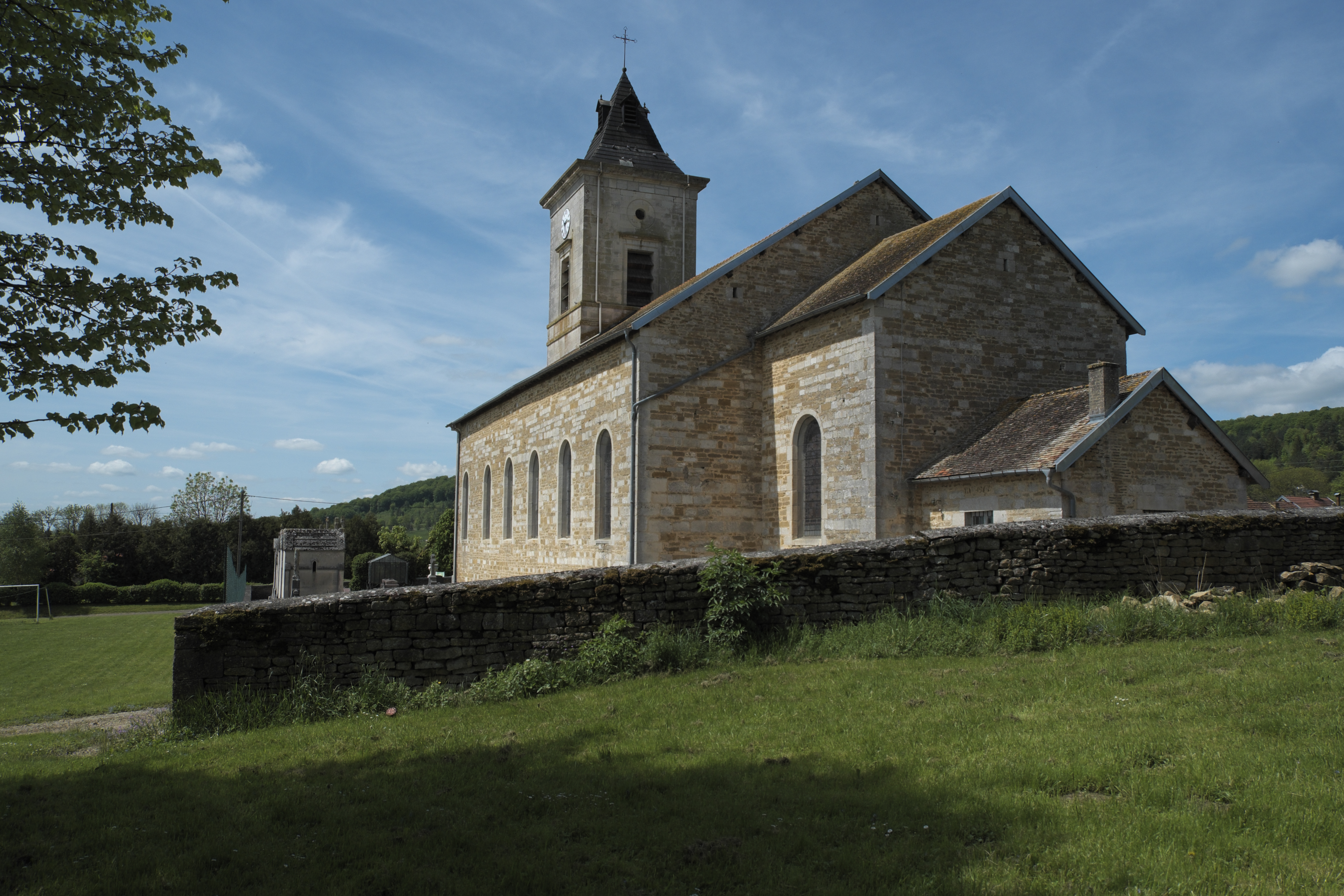 Katholische Pfarrkirche Notre-Dame-en-son-Assomption in Saint-Blin im Département Haute-Marne (Champagne-Ardenne/Frankreich)